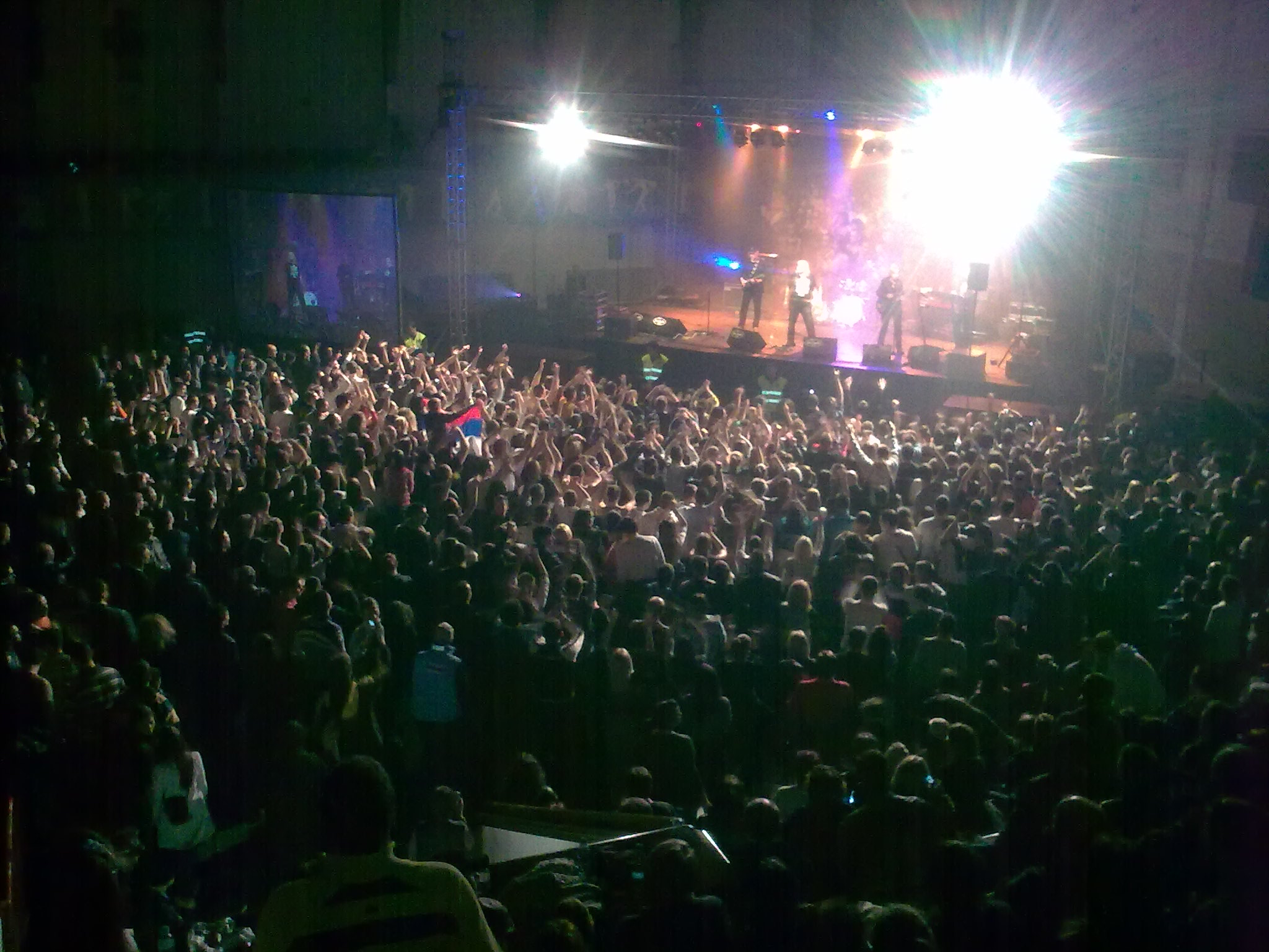 фото: Балша Ступар